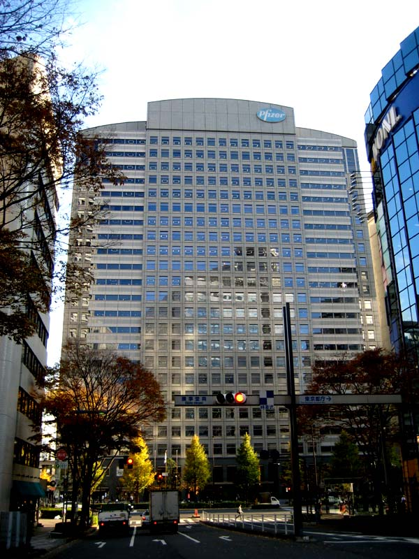 Shinjuku Bunka Quint Building 新宿文化クイントビル